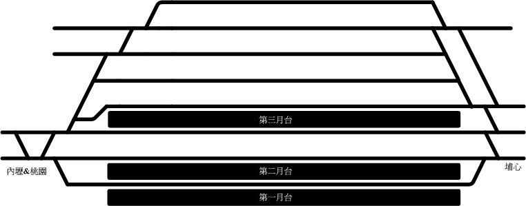 中壢站股道圖